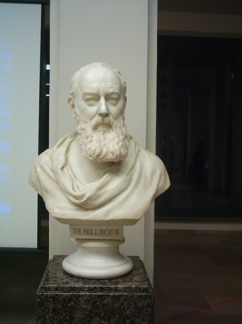 Theodor Billroth (1829 - 1894. Marmorbüste von C. v. Zumbusch im Langenbeck-Virchow-Haus Berlin, Luisenstr. 58-59. Gründungsmitglied und Ehrenmitglied der Deutschen Gesellschaft für Chirurgie.